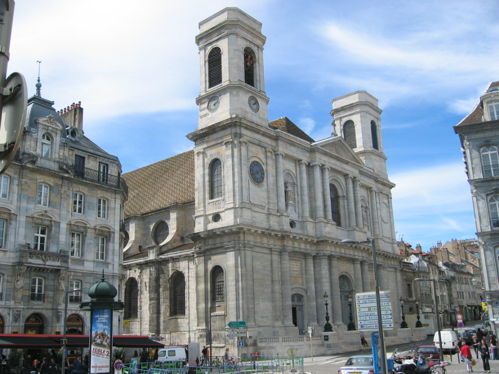 Basilique Sainte Madeleine de Besançon